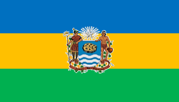 Bandera comunal de Curacaví, Chile Hecha con aporte de File:MUNICIPALIDAD DE CURACAVI.png